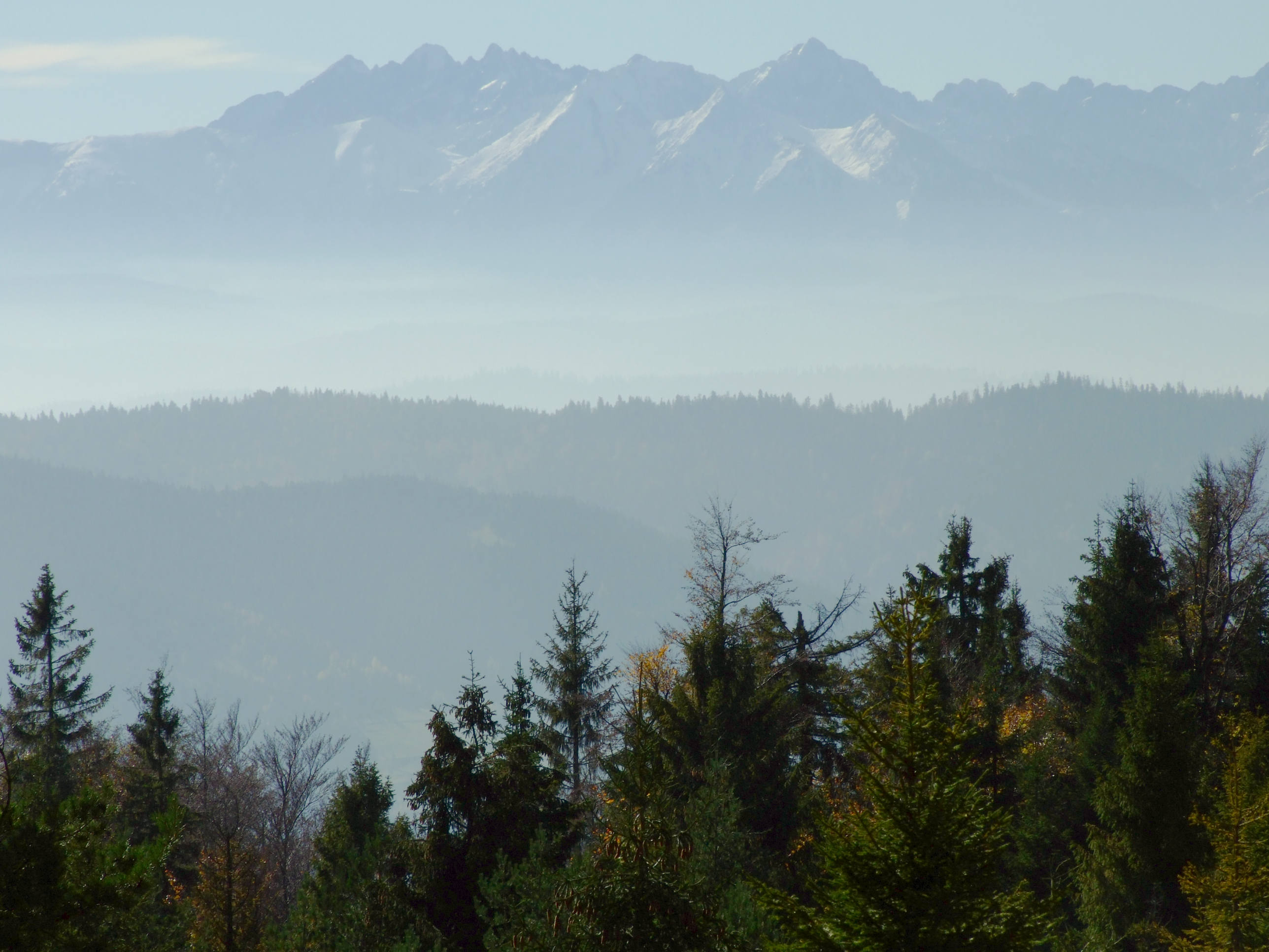 Widok z Gorców na Tatry